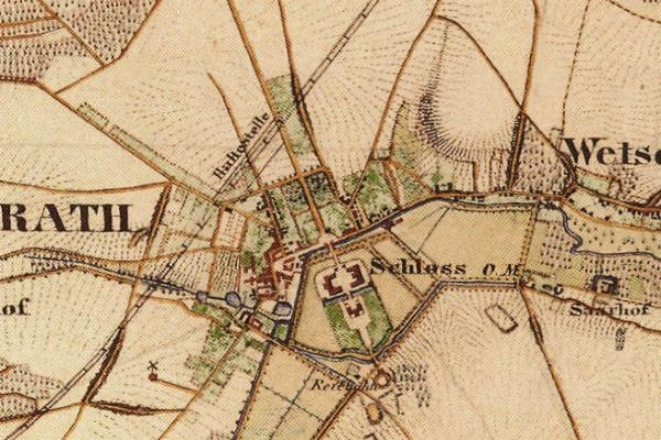 Preußische Kartenaufnahme 1846 -Uraufnahme